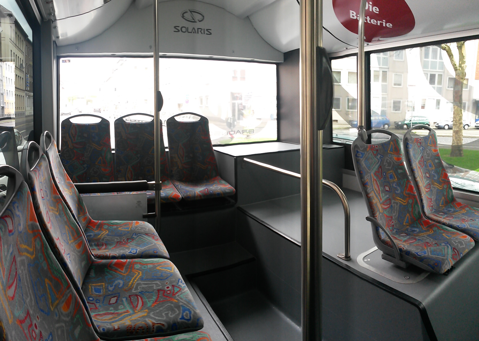 Innenraum von Wagen 1401 der Braunschweiger Verkehrs-AG: Die Batterie des Solaris Urbino 12 electric findet im Heckbereich des Fahrzeugs neben der hintersten Sitzreihe Platz, dort wo bei dieselbetriebenen Urbinos üblicherweise der Motor in Turmbauweise angeordnet ist.